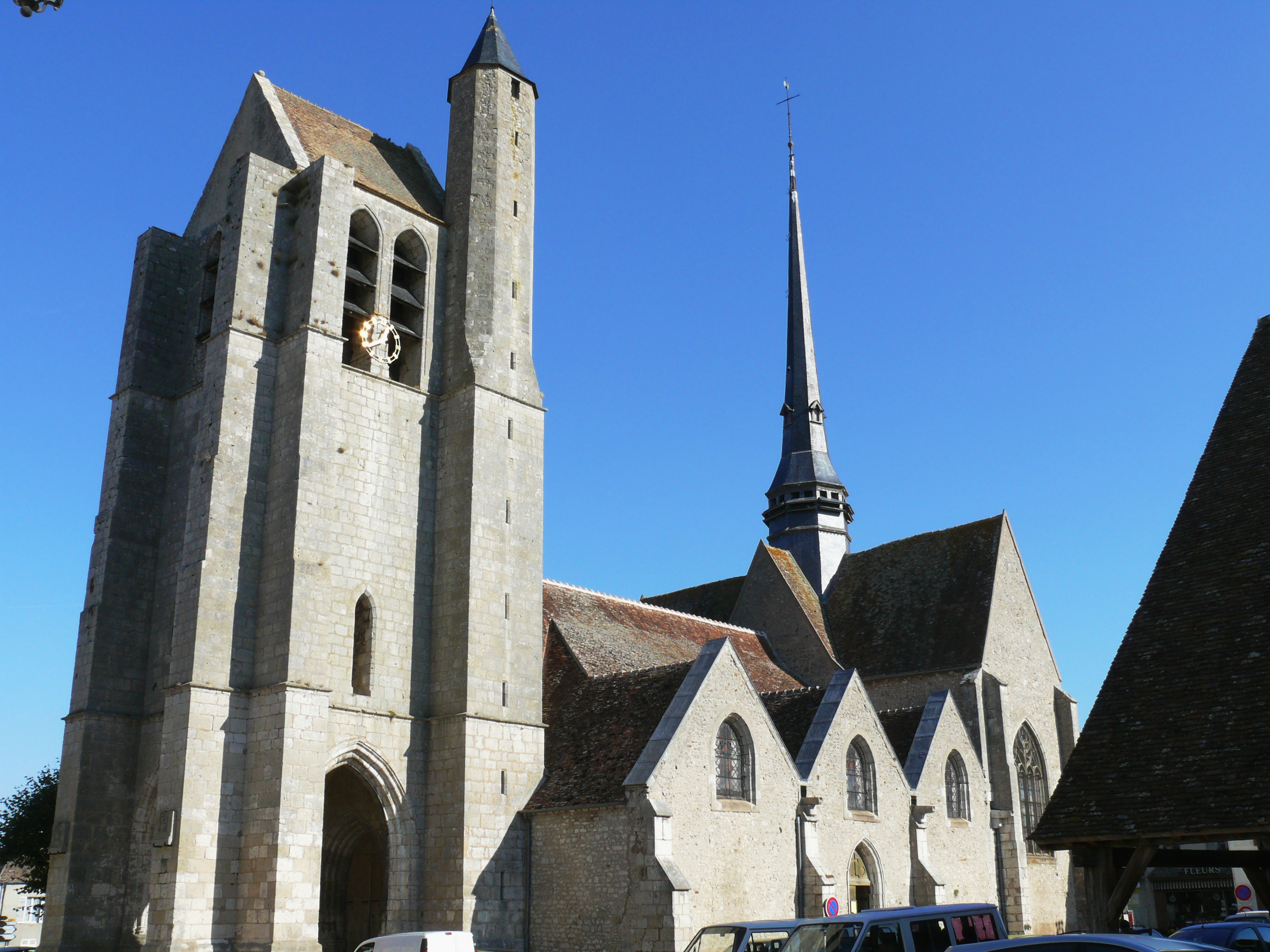 Egreville - Eglise Saint-Martin